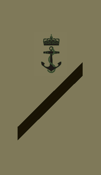 OR2 NOR - Gast-Visekonstabel